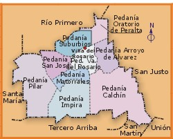 Pedanias del Departamento Río Segundo.